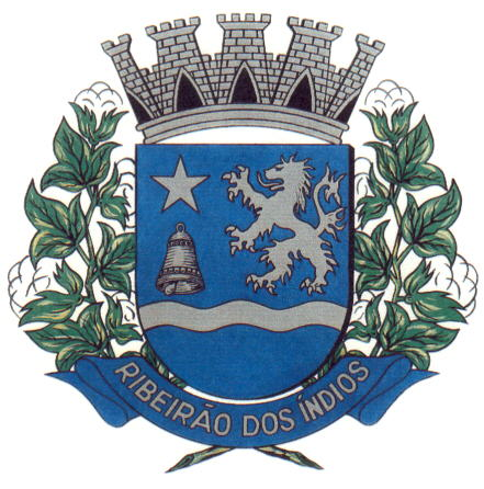 Brasão do Município de Ribeirão dos Índios, São Paulo, Brasil